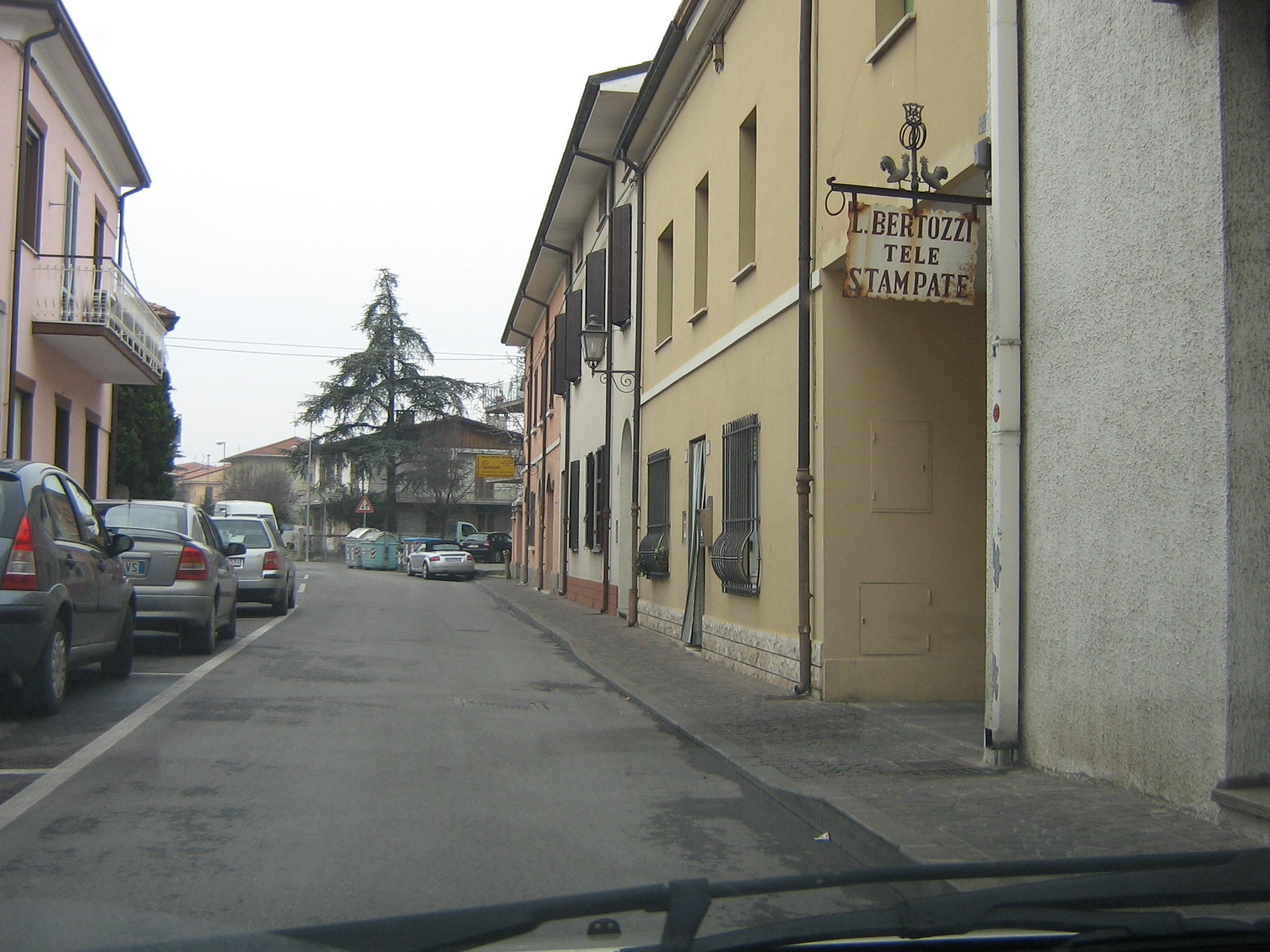 Le vie delle stamperie, Gambettola (FC), Italy